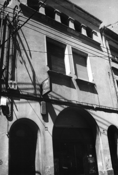 Casa Buxó del carrer concepció de Sabadell (enderrocada)